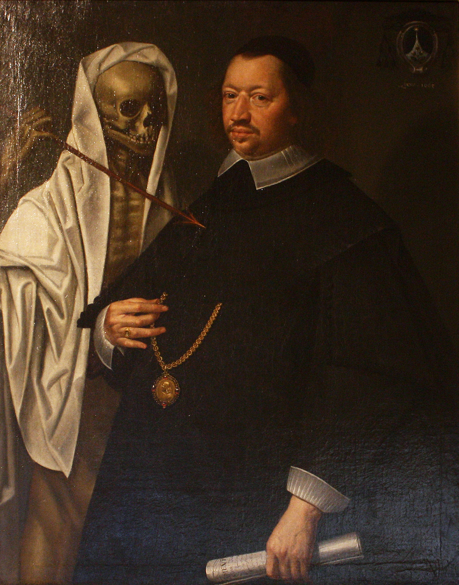 Köln, Franz Eick und der Tod. Kölnisch, 1663, Ölgemälde auf Leinwand. Kölnisches Stadtmuseum, KSM 1990/180